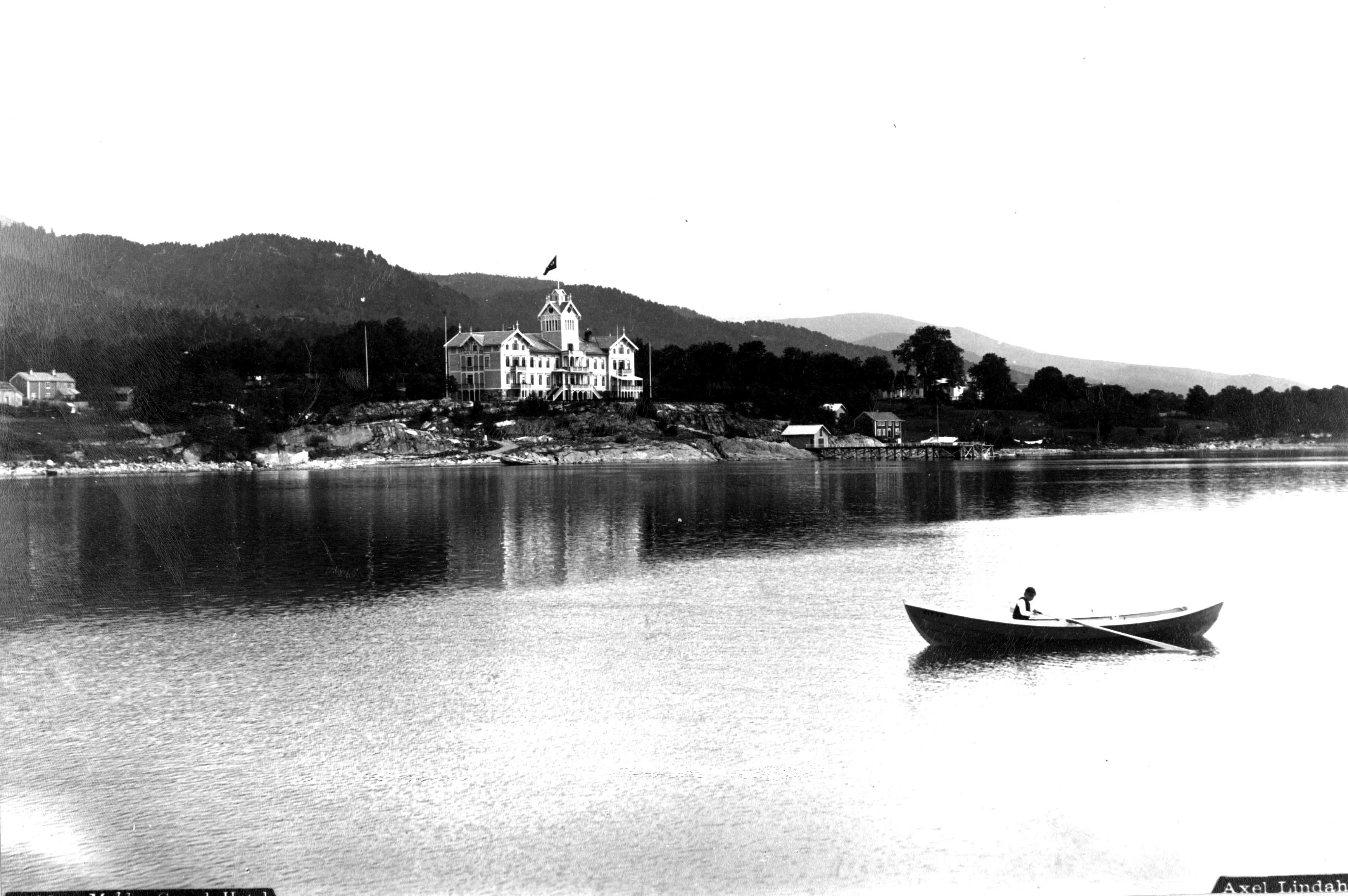 Grand Hotel, Molde.